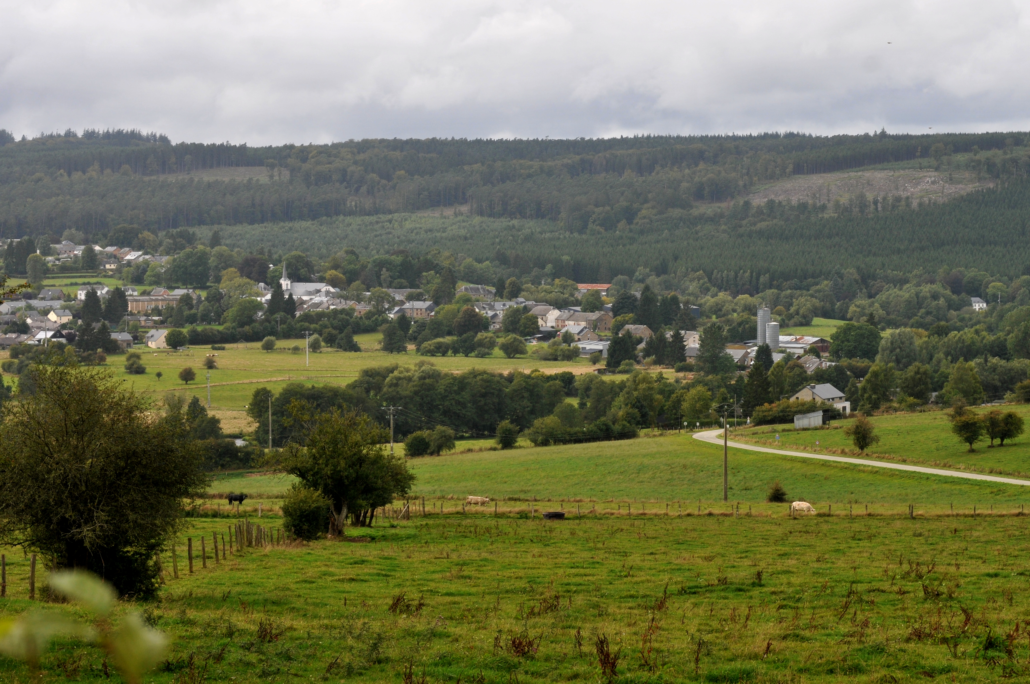 Vue sur le village de Lavacherie depuis le cimetière de la F.N.A.P.G